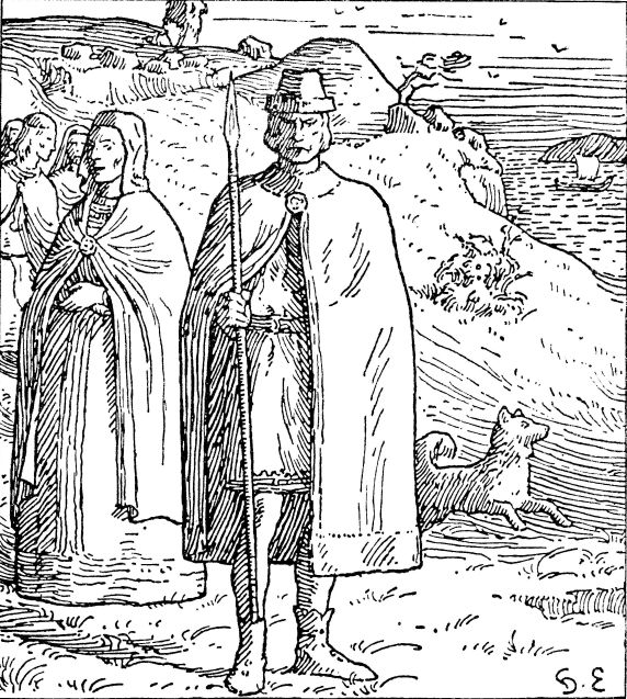 Halfdan Egedius: Illustration for Olav den helliges saga. Snorre 1899-edition. «Tore Hund gaar ned til Bryggen med Spydet Selshevner.» nb: «Tore Hund går ned til brygga med spydet Selshevner.» nn: «Tore Hund går ned til bryggja med spydet Selshemnaren.»